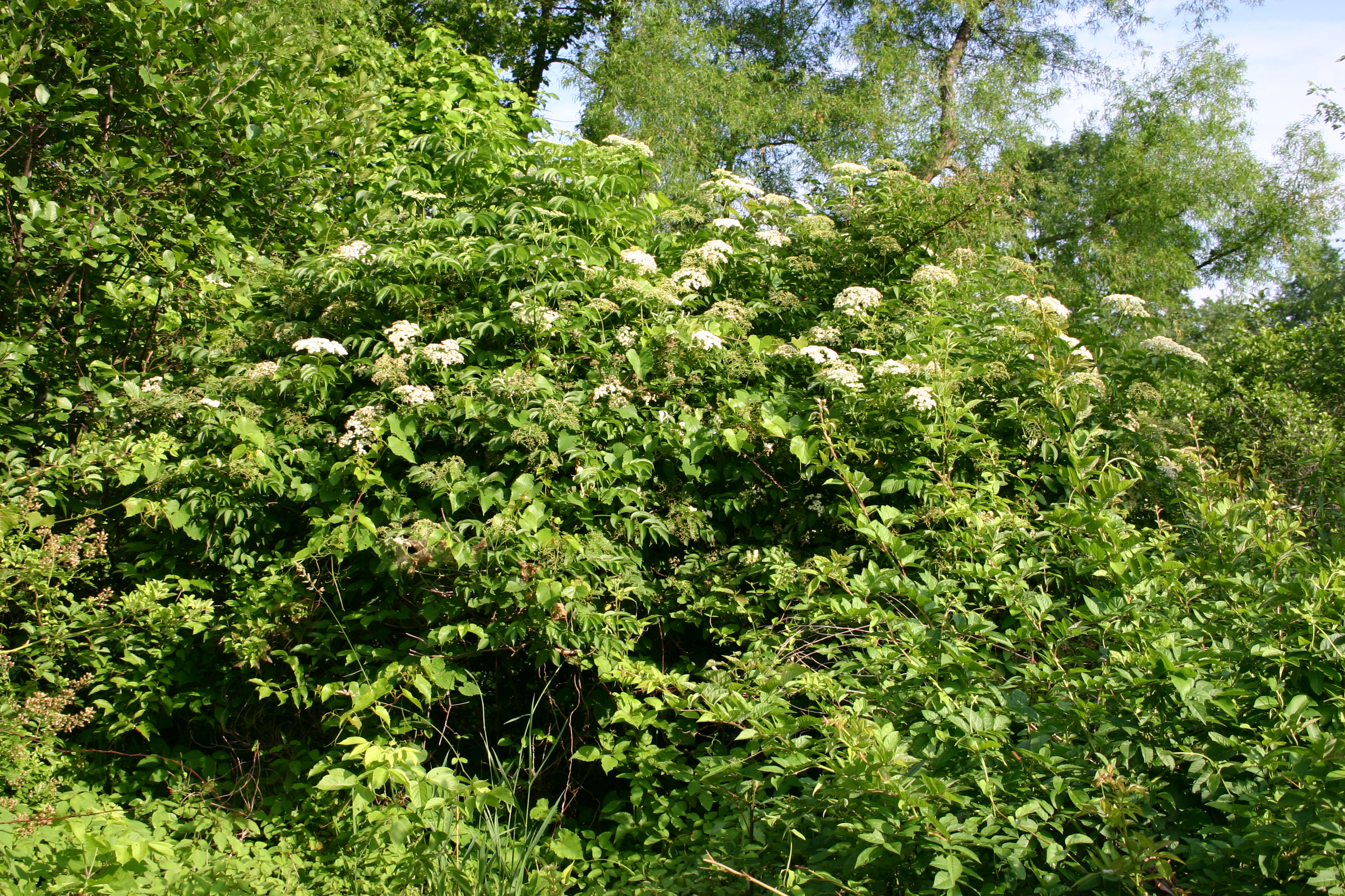 Sambucus canadensis in habitat